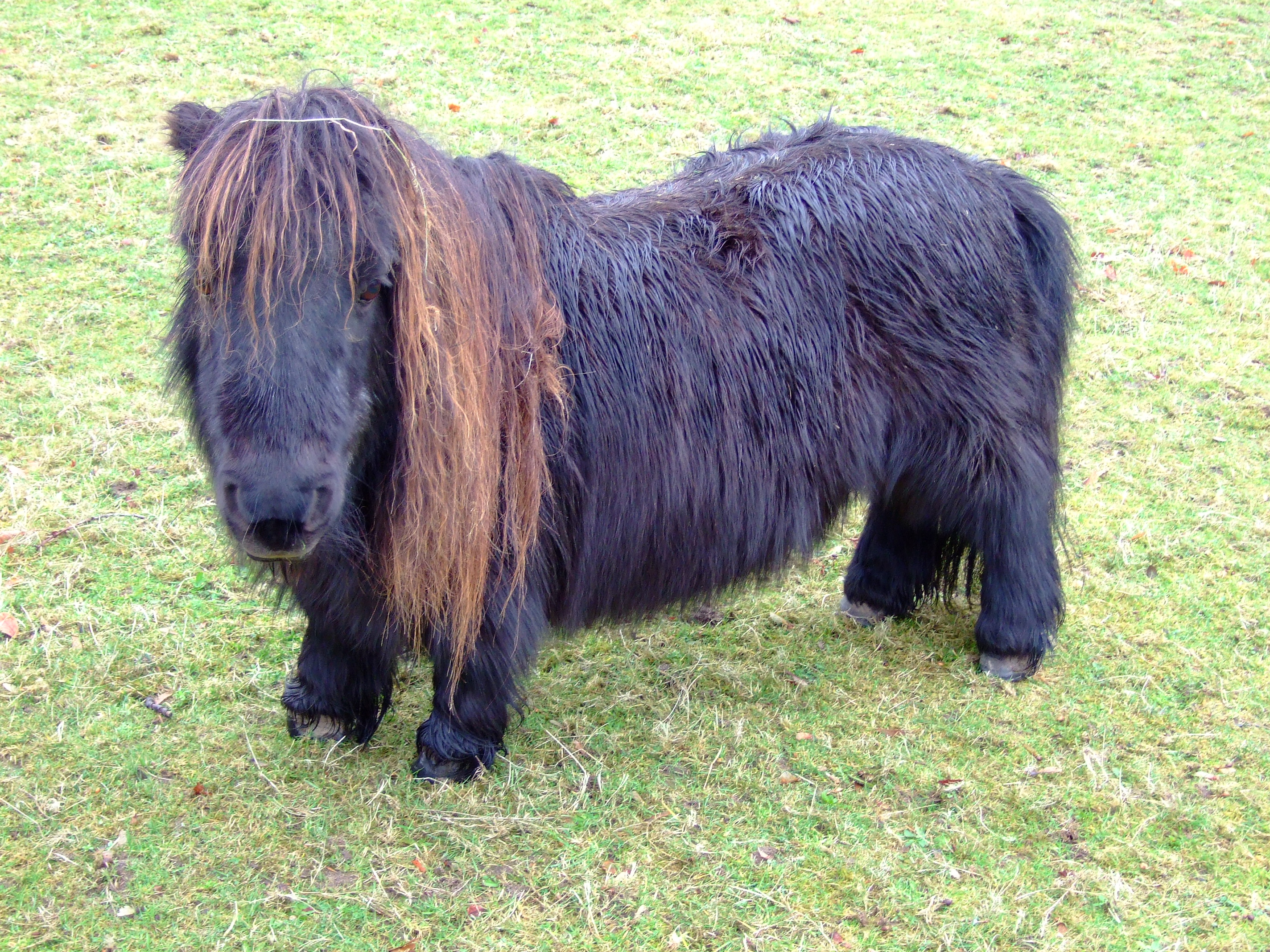 A dwarf horse